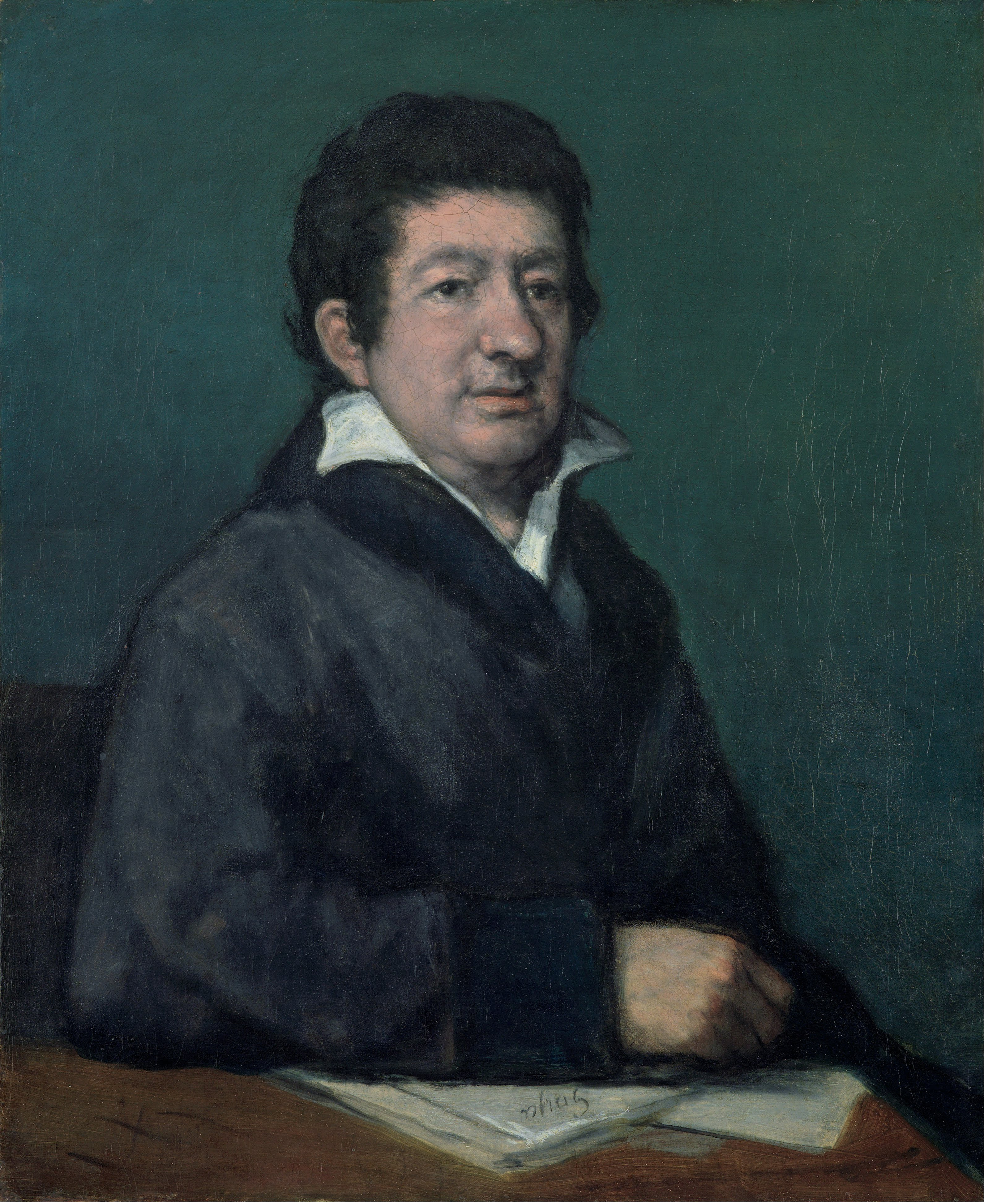 Retrato del poeta español Leandro Fernández de Moratín (1760-1828).